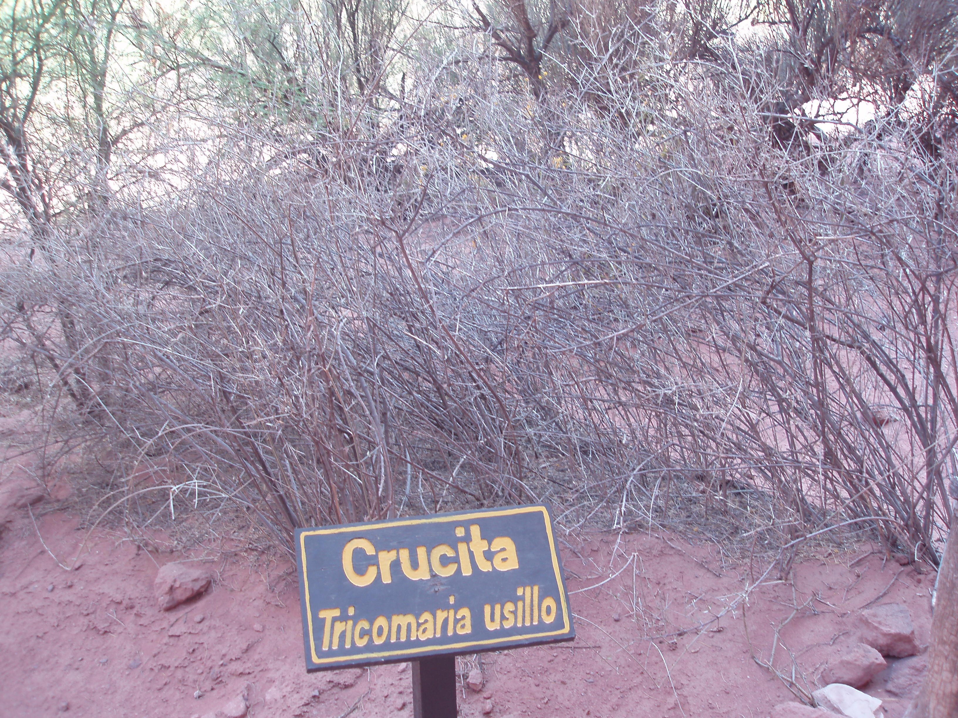 Tricomaria usillo, Parque Nacional Talampaya, Argentina